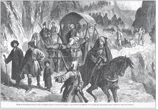 Рисунок художника Аурелия. Племя черкесов покидает свои горы, направляясь в Турцию в результате захвата их страны русскими войсками. Из книги Б. Едиджа "Черкесы-адыги в рисунках европейских художников XVII-XIX веков". Майкоп, 2009.